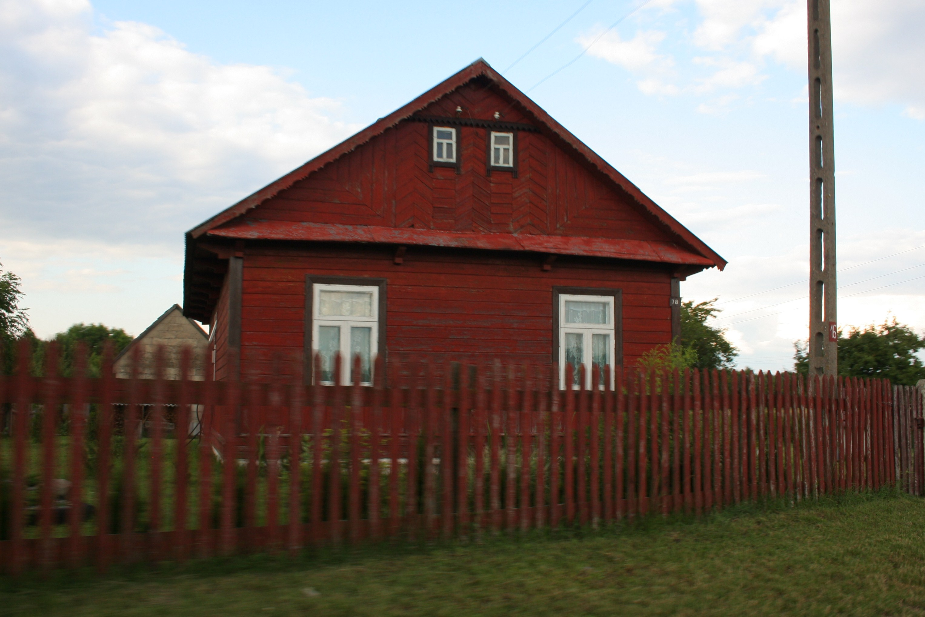 Dom mieszkalny w Wojnówce.